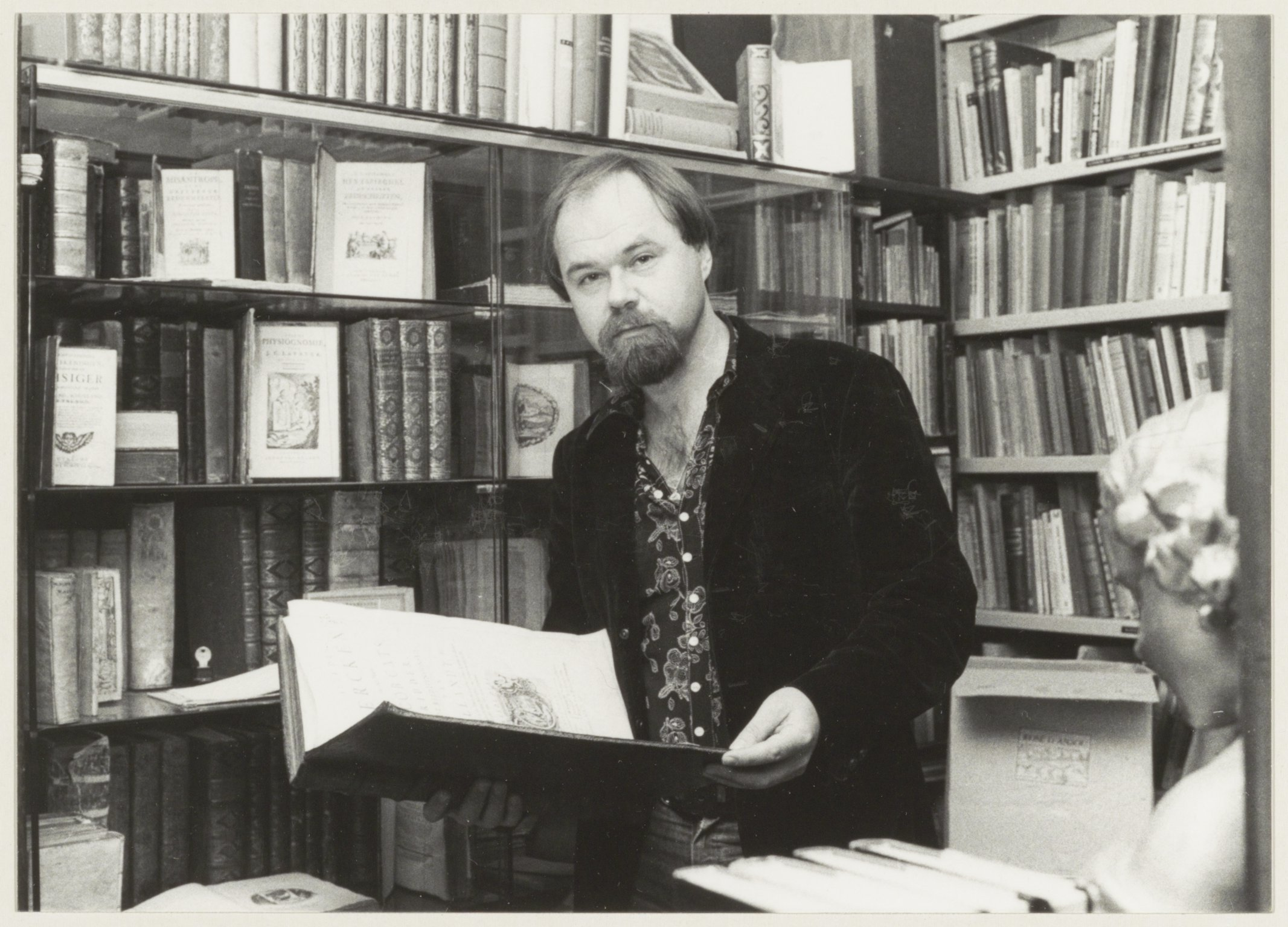 CollectieCollectie Fotoburo de BoerInventarisnummerNL-HlmNHA_54011478NL-HlmNHA_1478_19993KBeschrijvingInterieur boeken antiquariaat aan de Kleine Houtstraat. Foto: Bubb Kuyper eigenaar.FotonummerNL-HlmNHA_1478_2921DocumenttypePortrettenVervaardigerBoer, Cees de (1918-1985) Soort vervaardigerFotograaf AnnotatiesD59.1 HD151180PersonenKuyper, Bubb Functies personenantiquair LandNederland ProvincieNoord-Holland GemeenteHaarlem PlaatsHaarlem StraatKleine Houtstraat GeografischCentrum Begindatum11-1980Einddatum11-1980TechniekFoto TrefwoordenBoeken